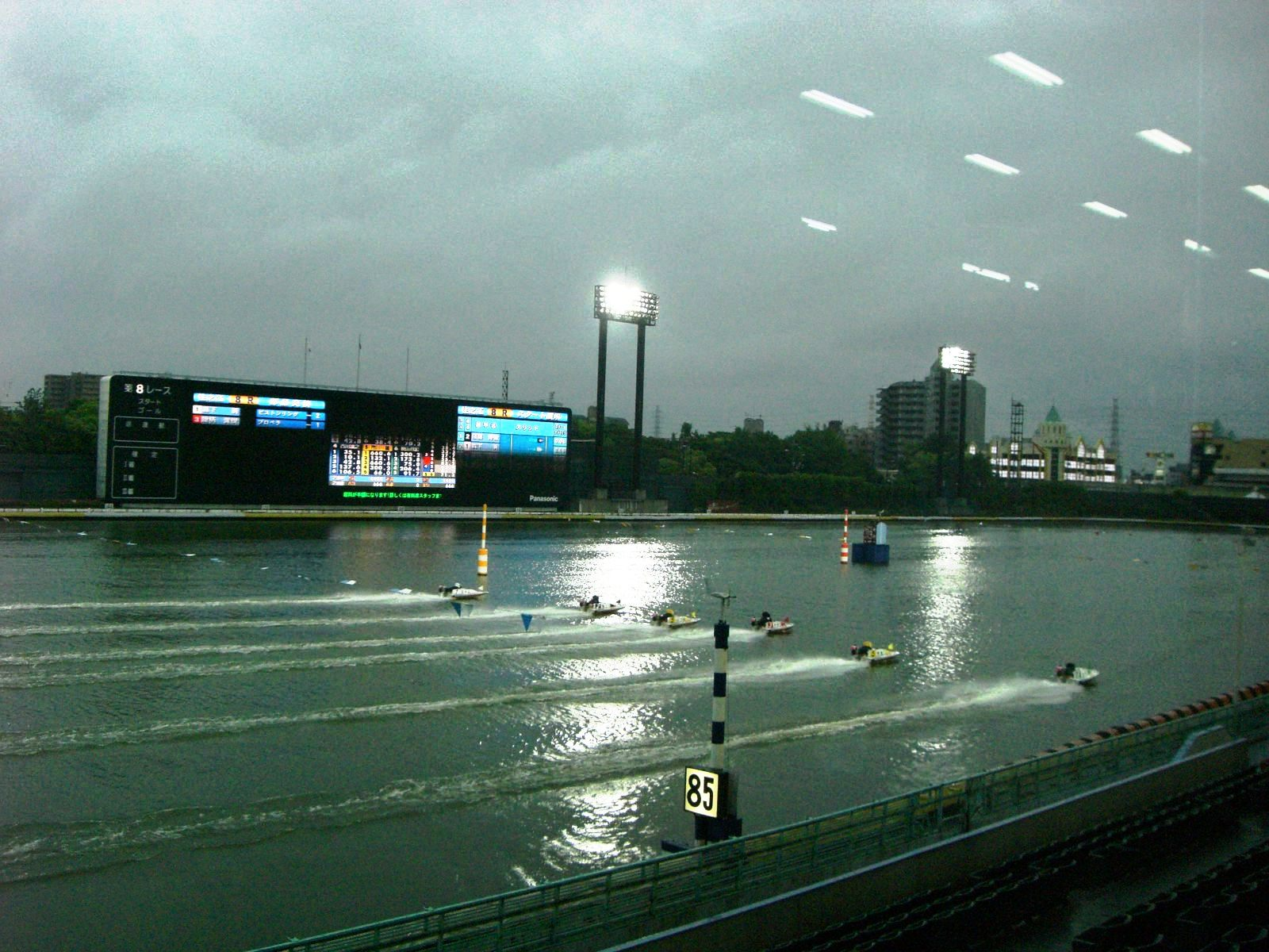 KYOTEI at Suminoe OSAKA